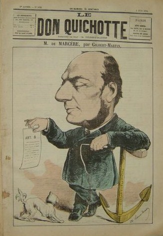 Caricature d'Emile de Marcère par Gilbert-Martin